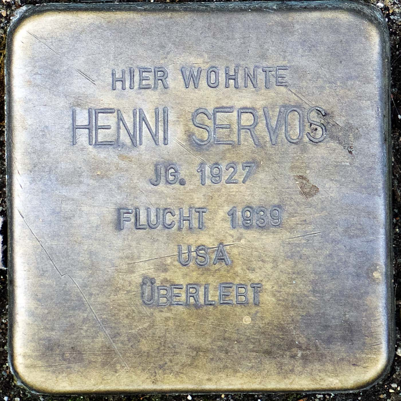 Stolperstein für Henni Servos (Willich)